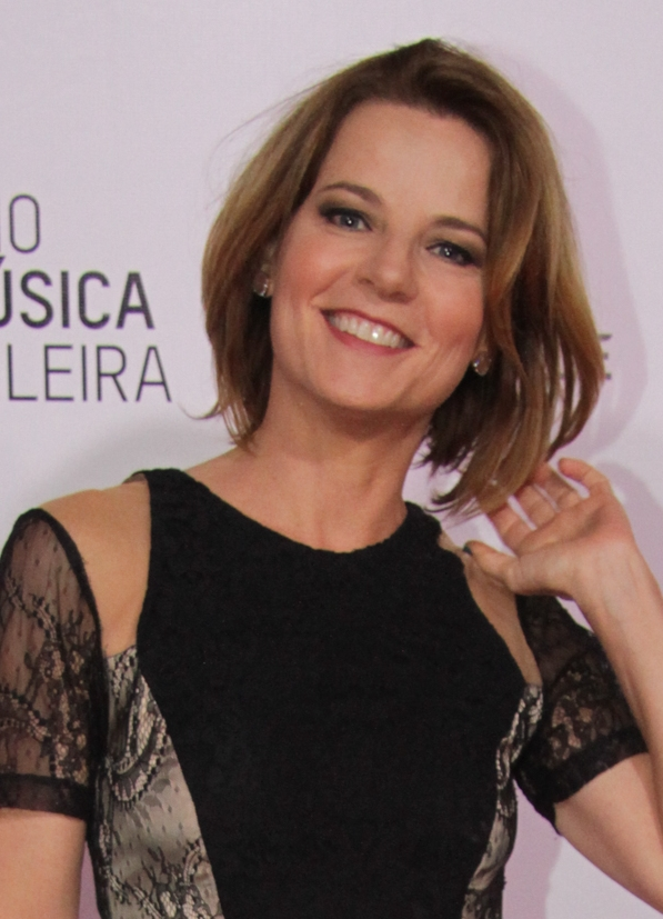 Vera Zimmermann - 26° Prêmio da Música Brasileira 2015, no Theatro Municipal, no Centro do Rio de Janeiro/RJ. (10/06/15) Foto: Roberto Valverde/Divulgacão